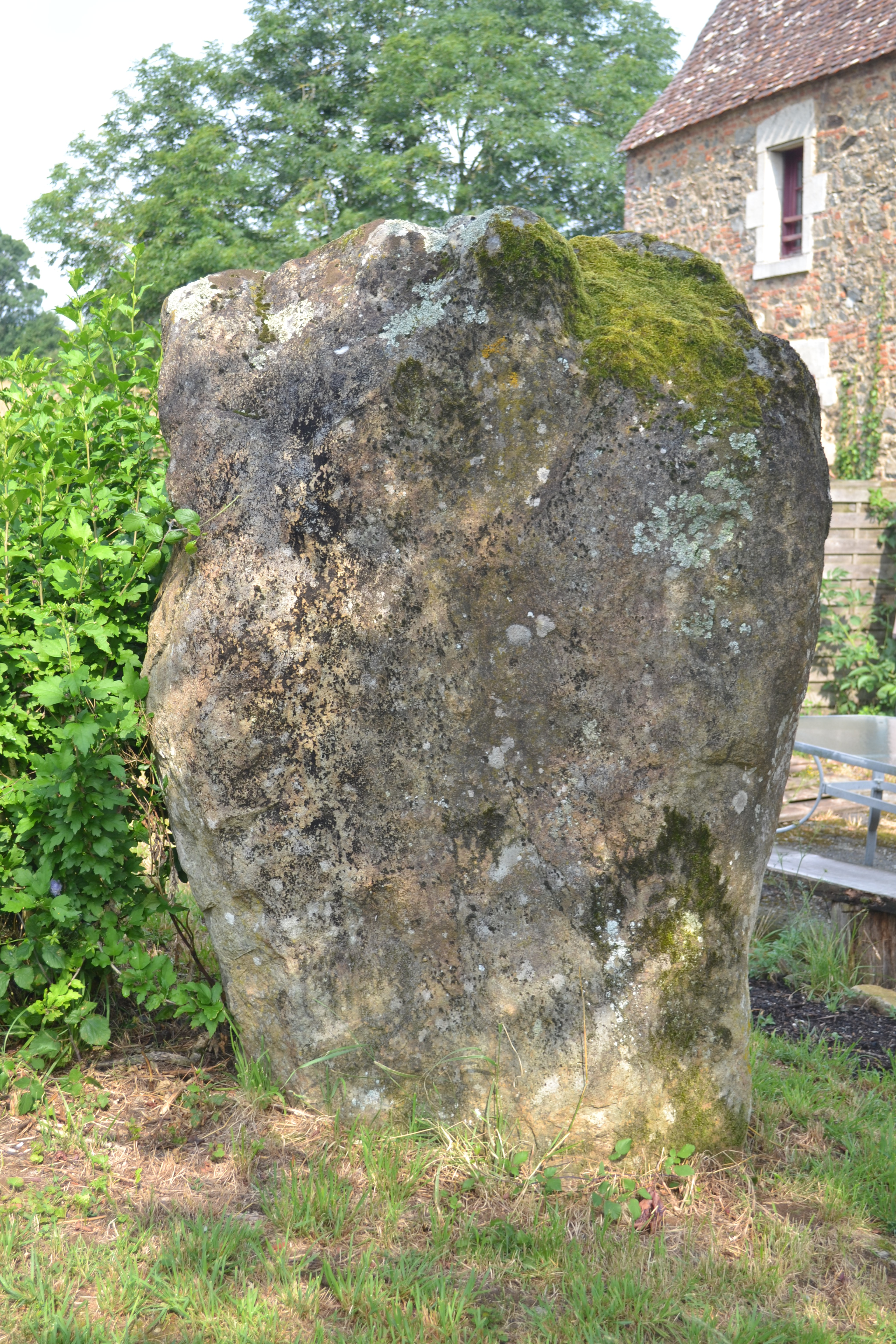 Menhir de la Chauvinière à Monsireigne (85).